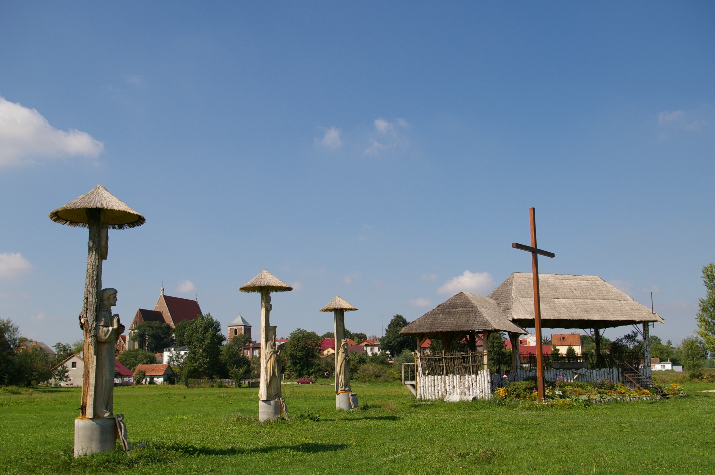 Łąka Świętych i Błogosławionych Polskich w Wiślicy